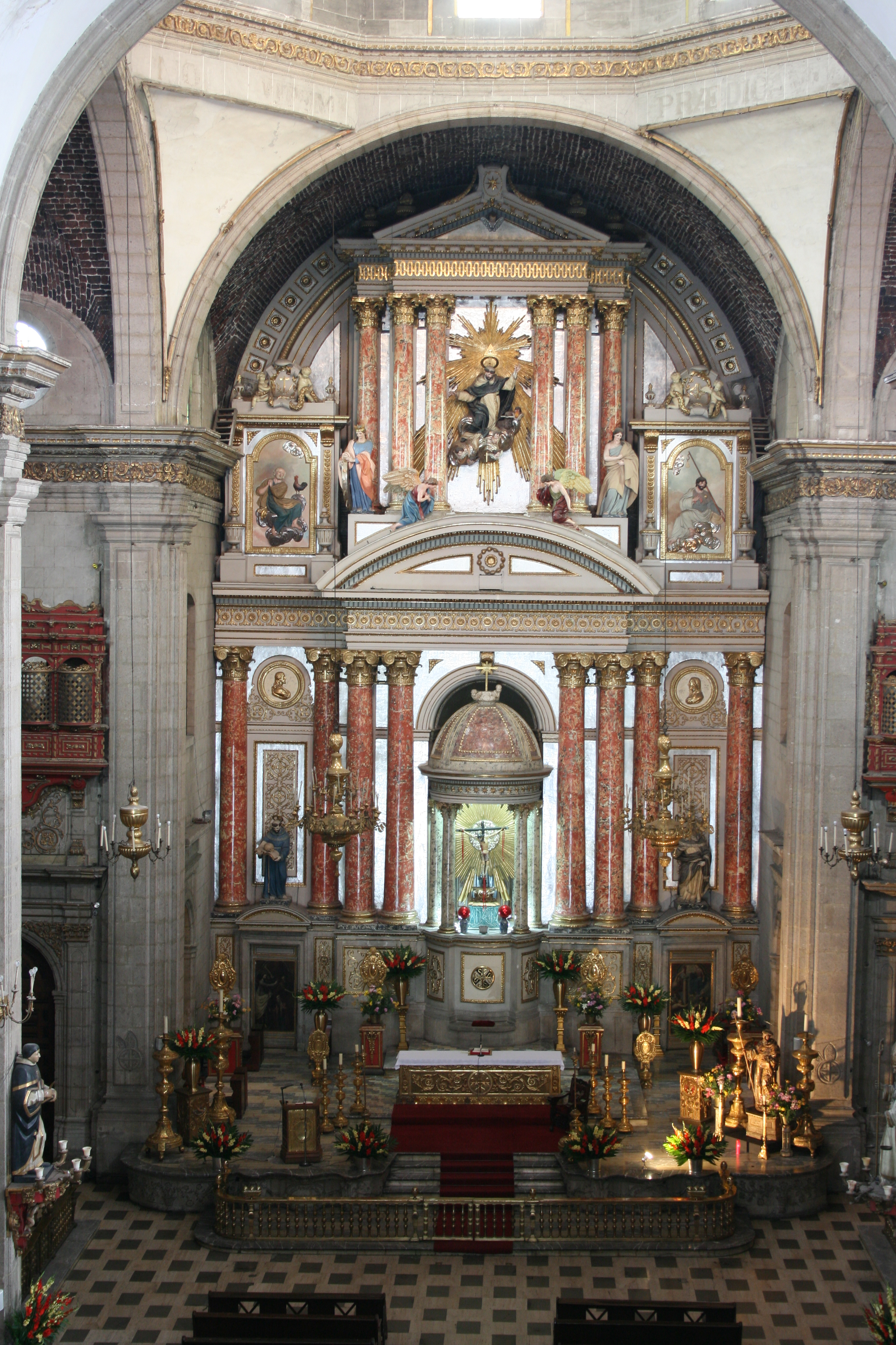 Retablo Principal Templo de Santo Domingo. Ciudad de México. Obra de Manuel Tolsá.